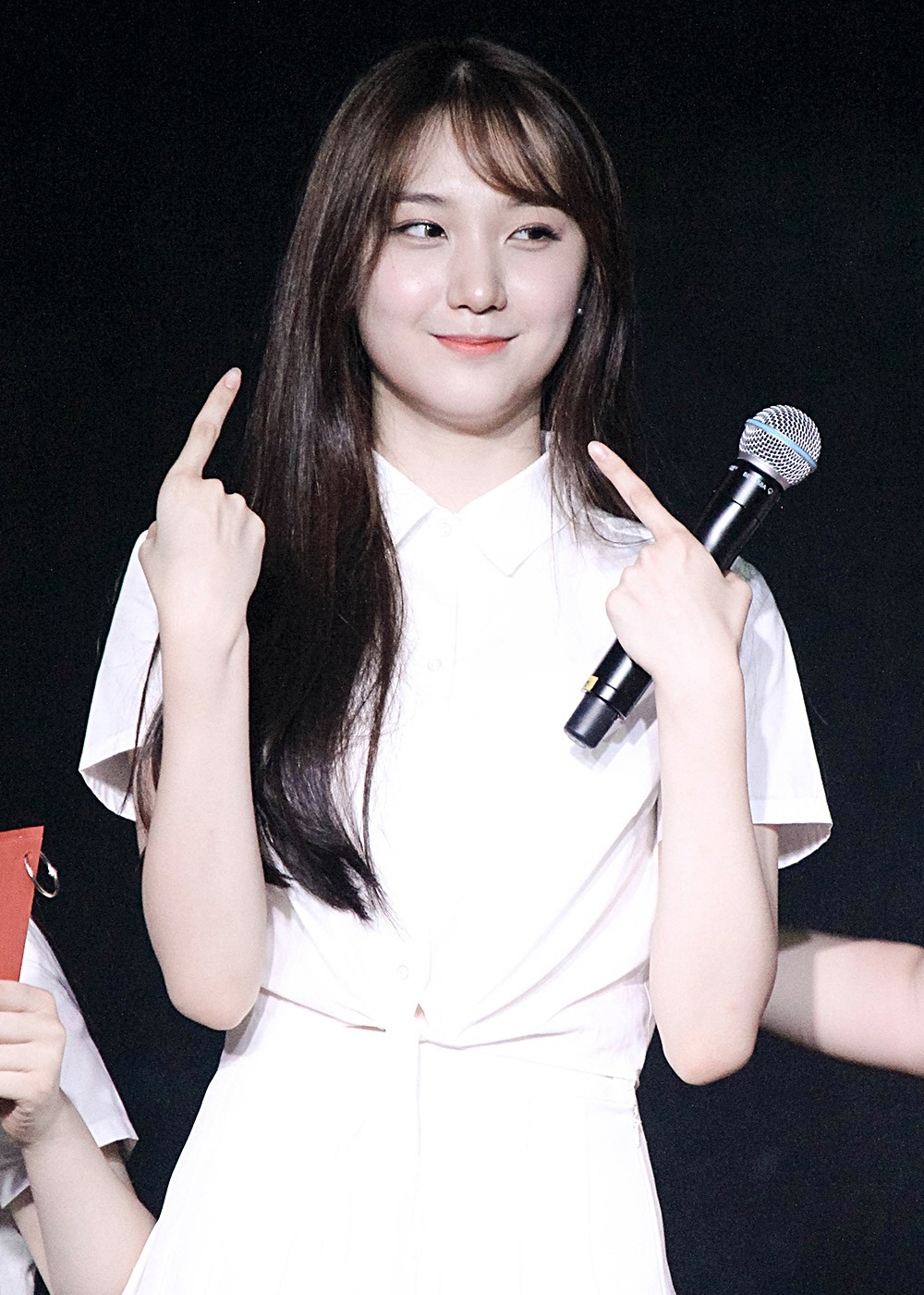 160702 플레디스걸즈 콘서트 김민경 강경원 김예원 배성연 카일라 직찍